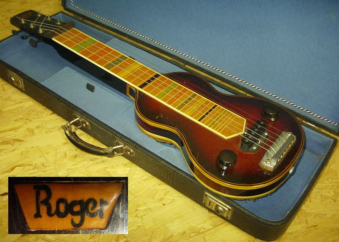 Bildbeschreibung: Roger Hawaii Gitarre mit in der Kopfplatte eingelegtem Firmenname, Pickup nicht original Quelle: eigens Foto Fotograf/Zeichner: bodoklecksel 19:56, 31. Mär 2006 (CEST) Datum: 2006... Sonstiges: ...